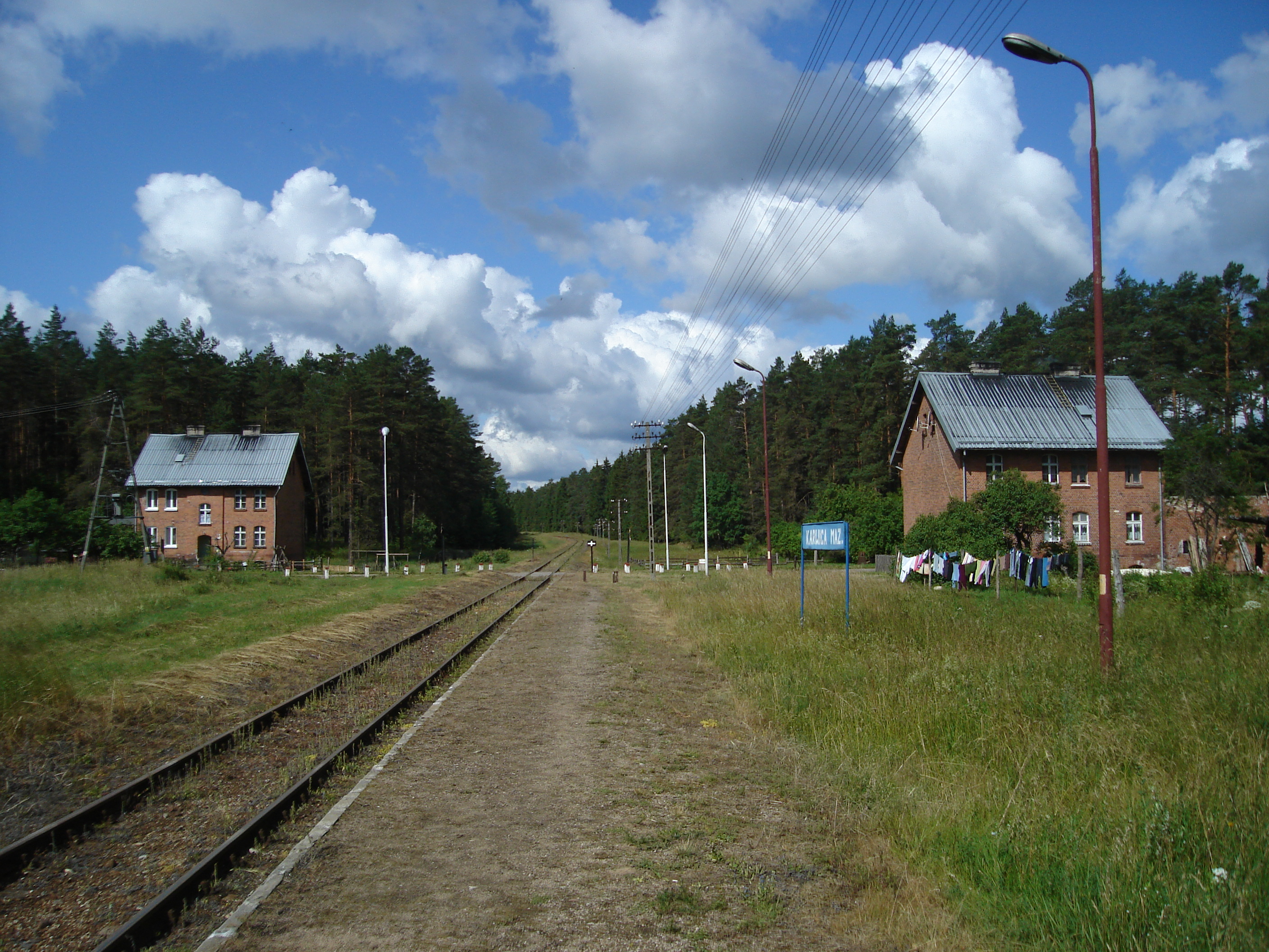 Widok z przystanku kolejowego